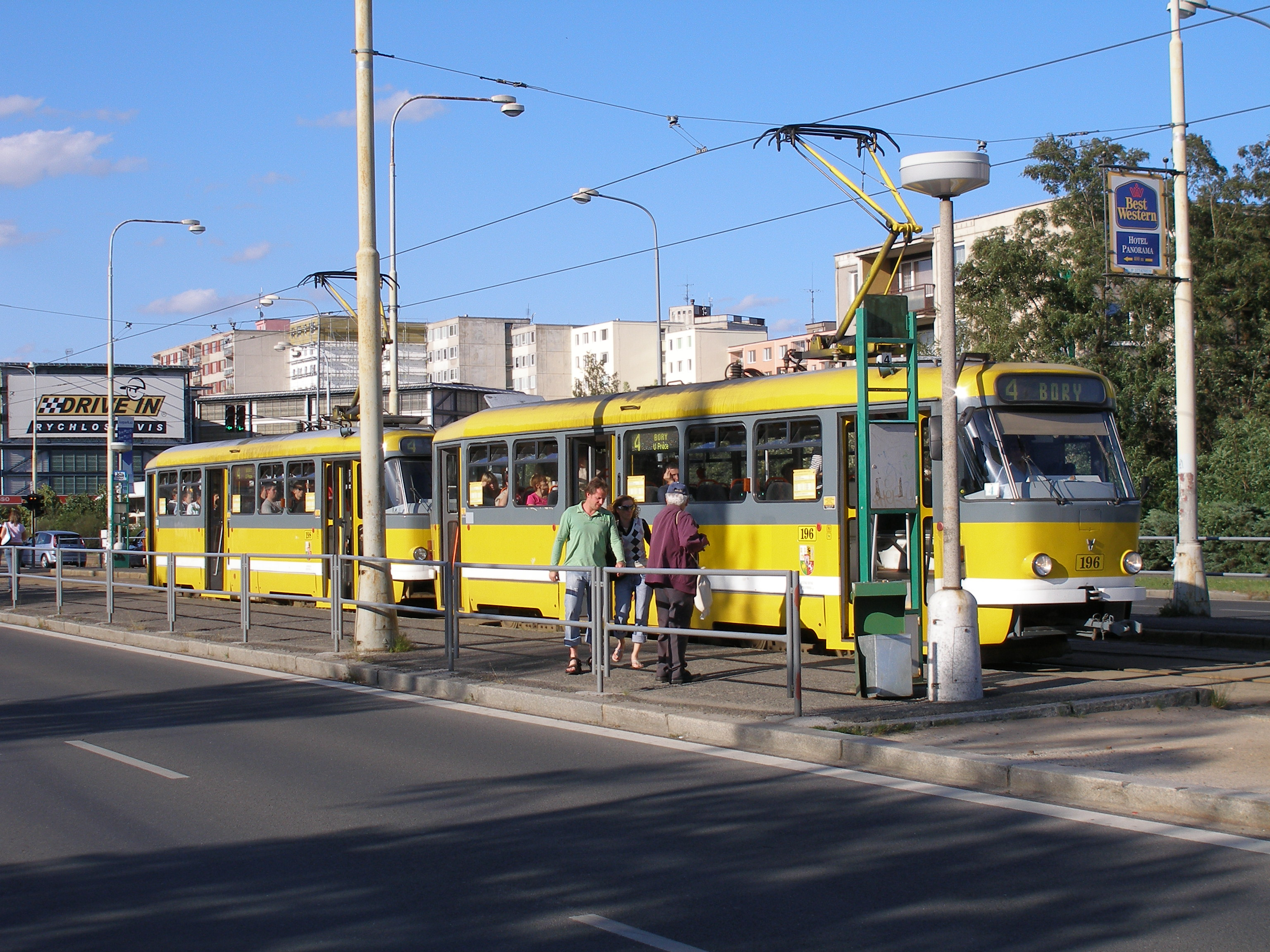 Tram T3P in Plzeň, Czech Republic. Tram stop "Sokolovská", Line 4.